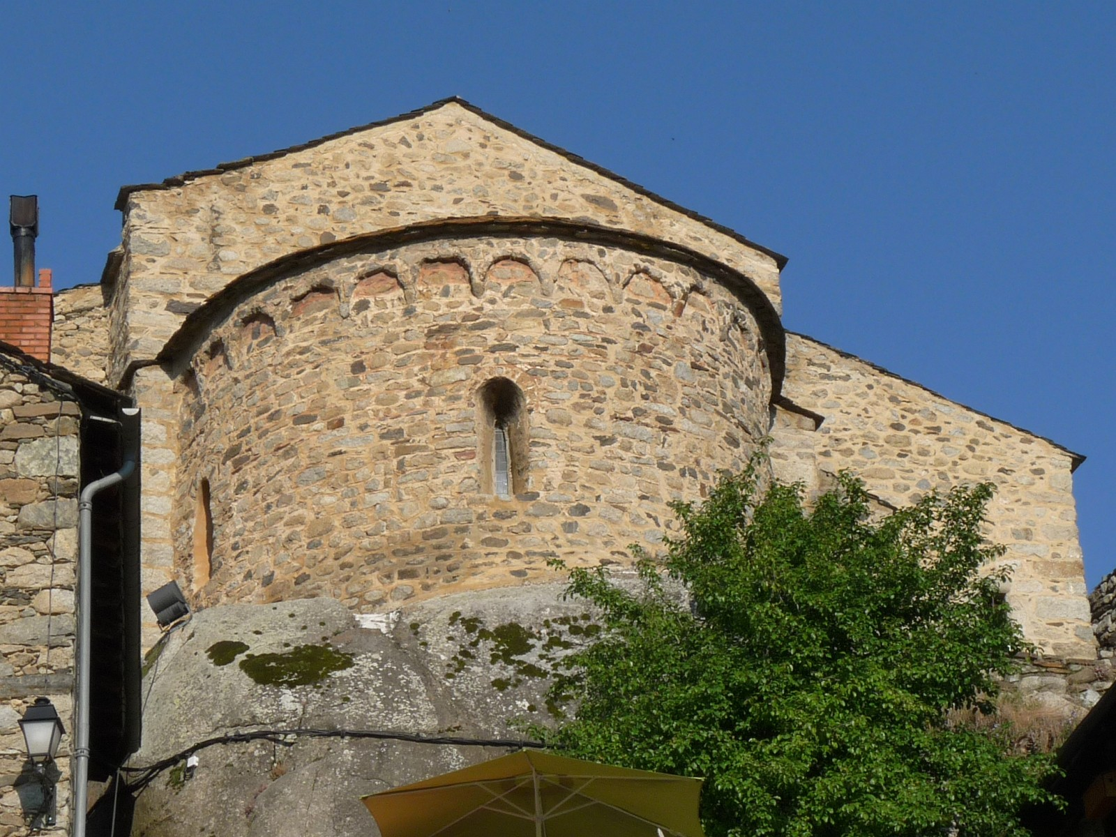 Chevet de l'église romane, Angoustrine, Pyrénées-Orientales, France